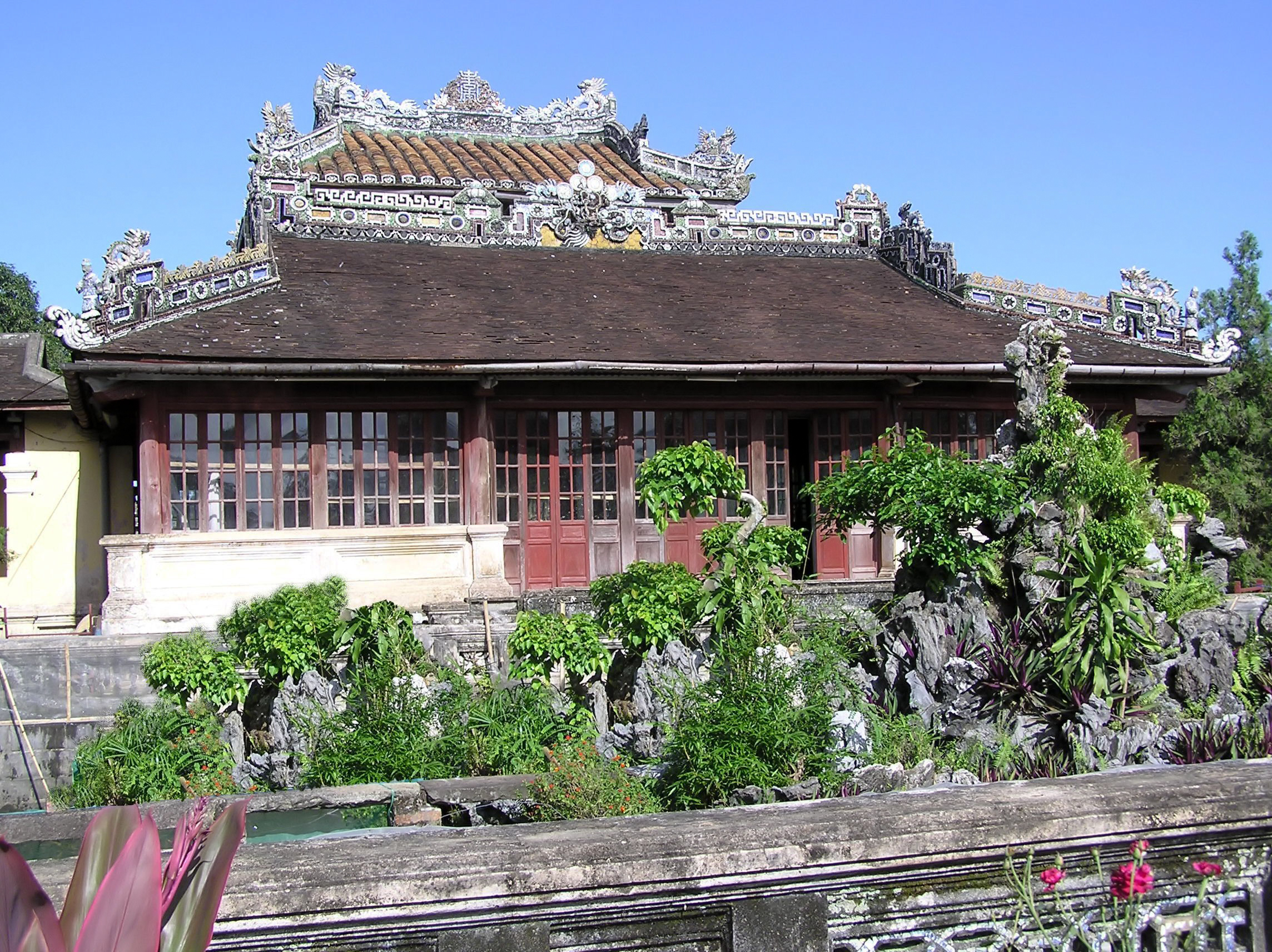 Thai Binh Ngu Lam Thu Lau (bibliothèque royale) - Citadelle de Huế - Vietnam